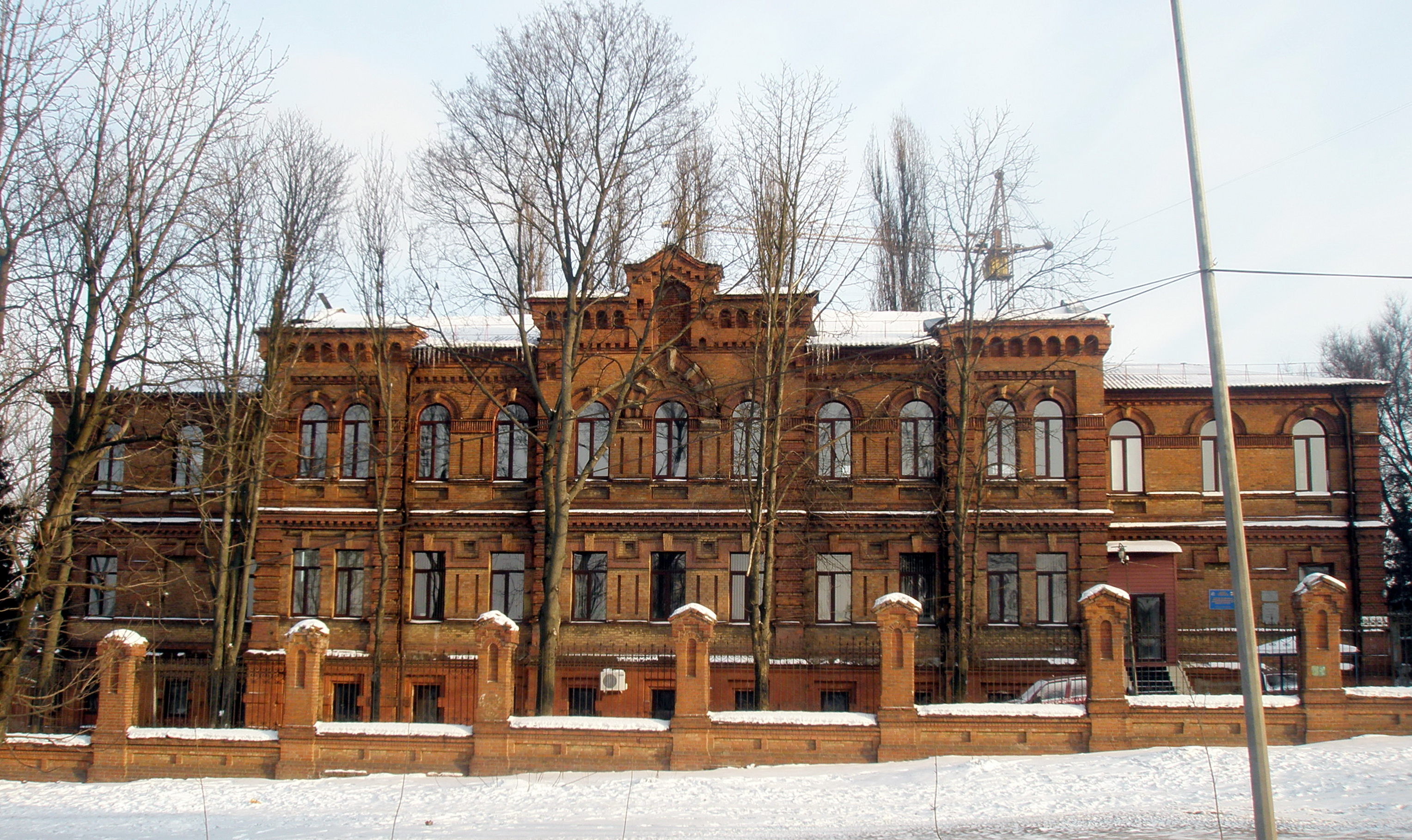 Городская инфекционная больница им. Н.А. Семашко на ул. Перекальского в Курске